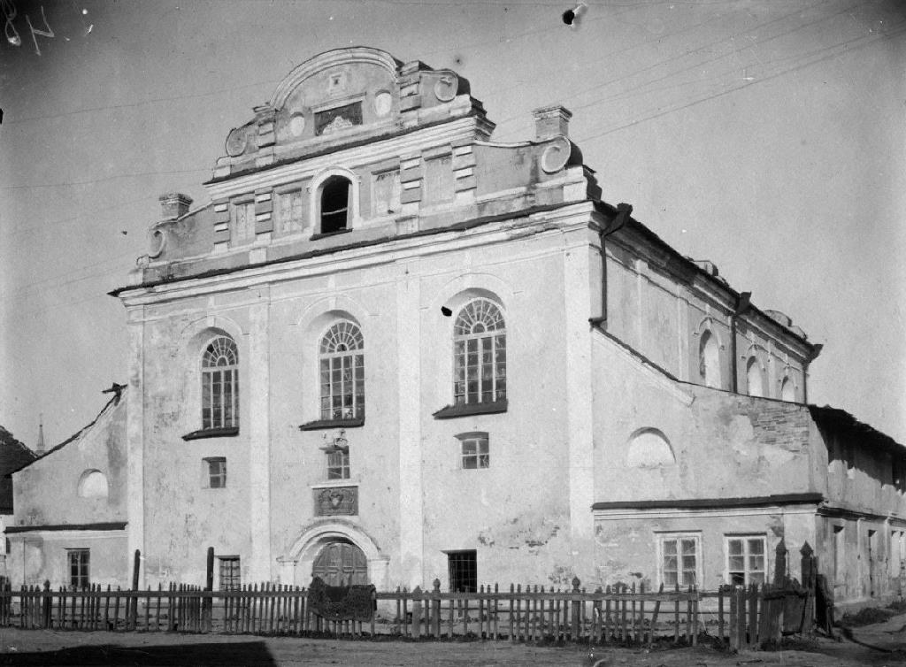 Синагога 18 века в Баре, Винницкая область.